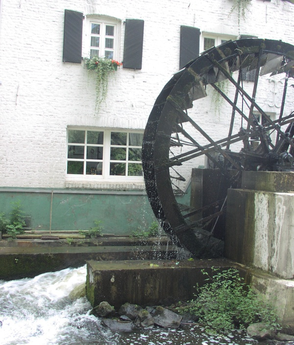 Die Mühlrather Mühle in Schwalmtal, die älteste Wassermühle am Niederrhein anno 1447